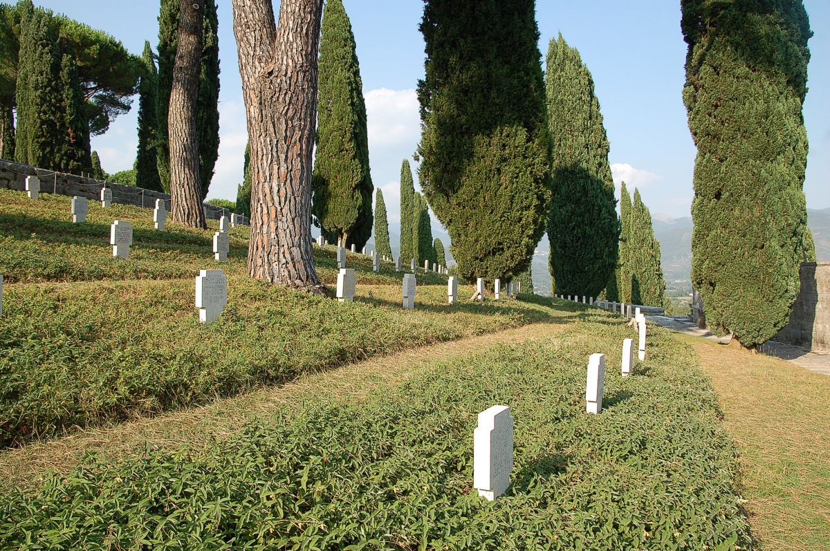 Der deutsche Soldatenfriedhof Cassino